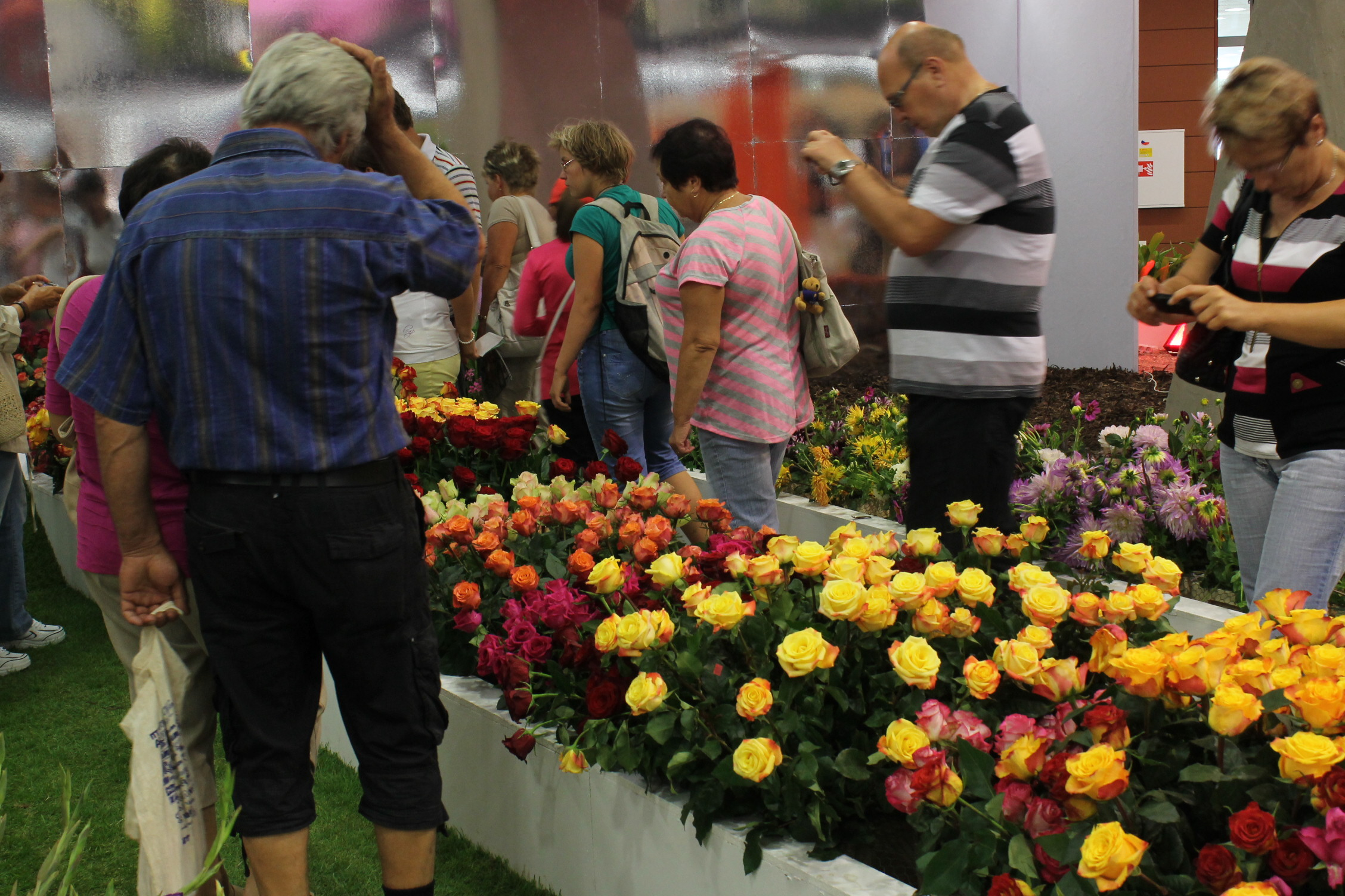 Flora Olomouc